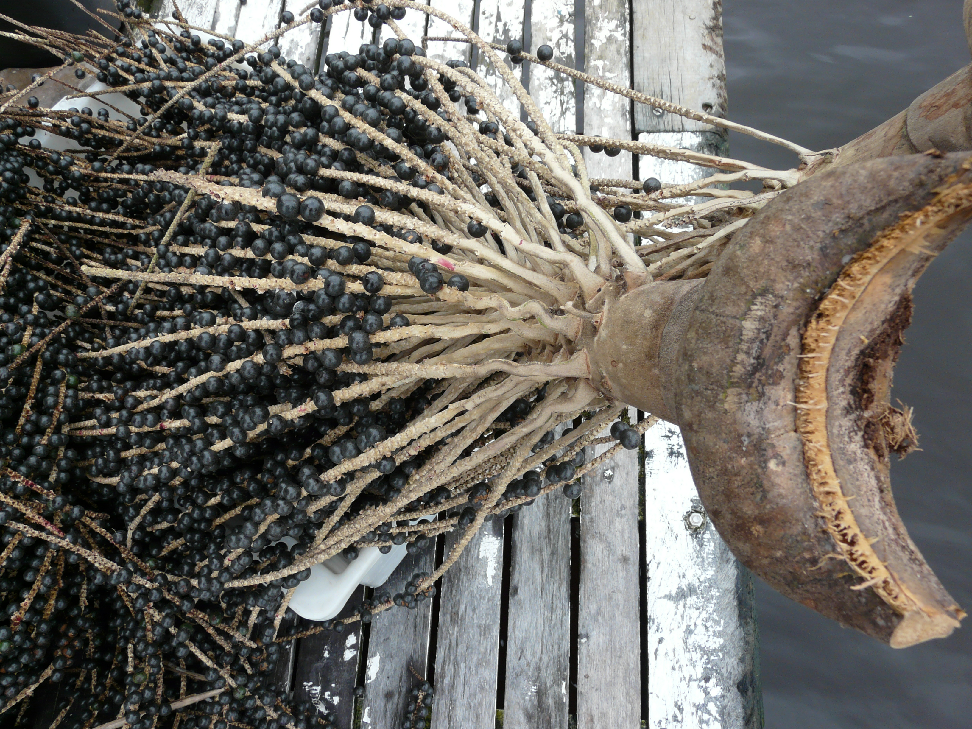 Salat-euterpepalmi (Euterpe oleracea) marjad (assai). Pildistatud aprilli lõpus Rio Negrol Amasoonias. Oma töö.